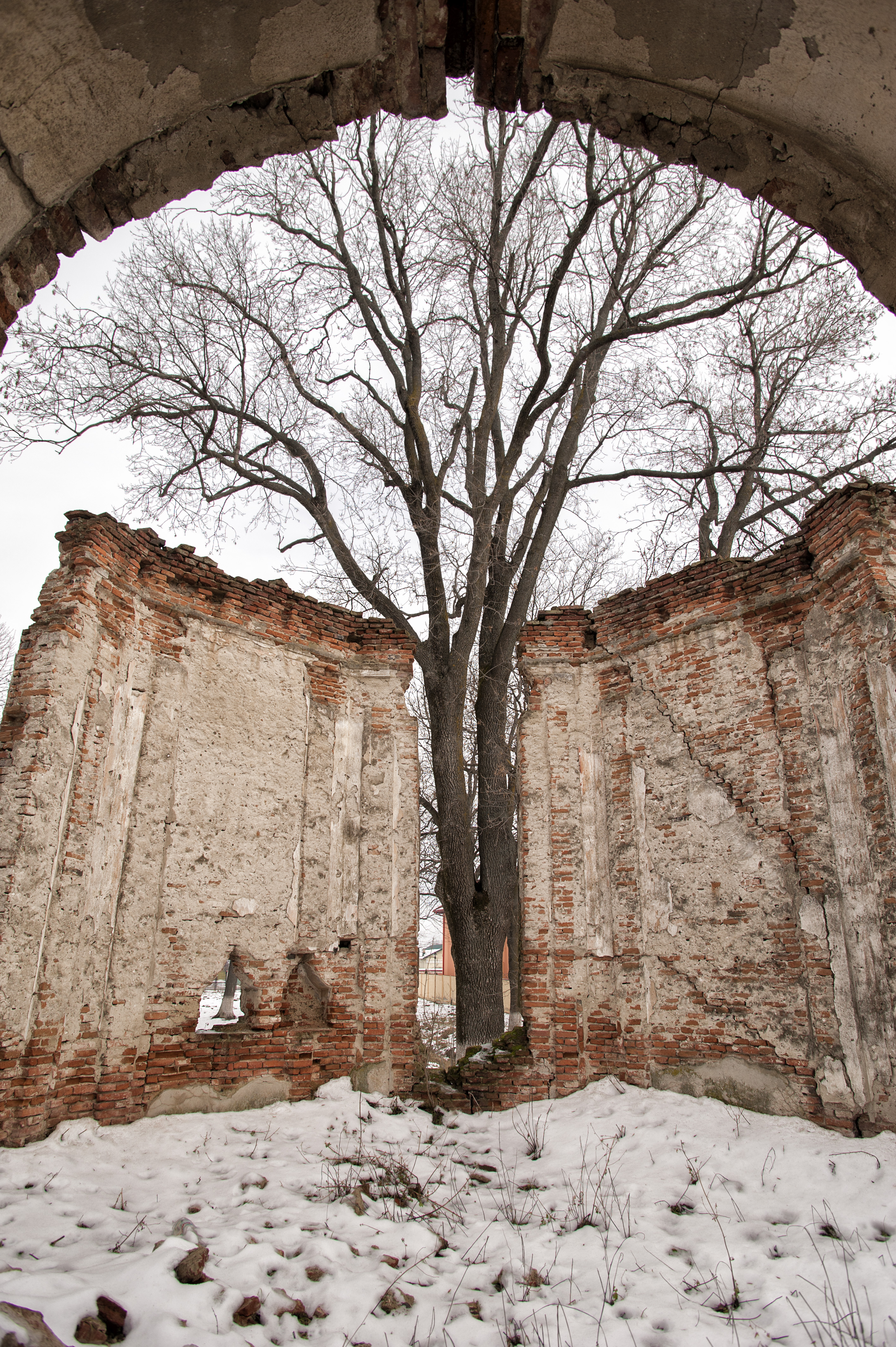 Capelă 05